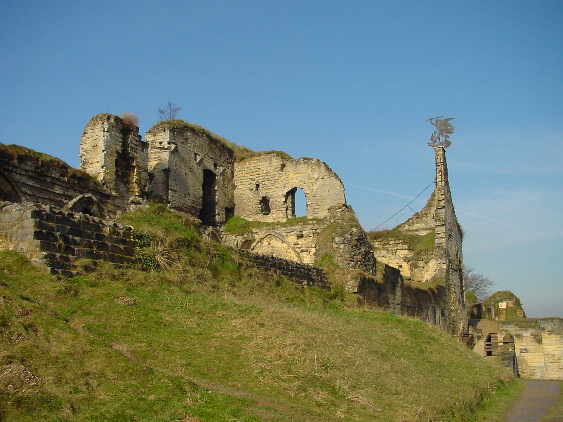 Ruïne van kasteel Valkenburg